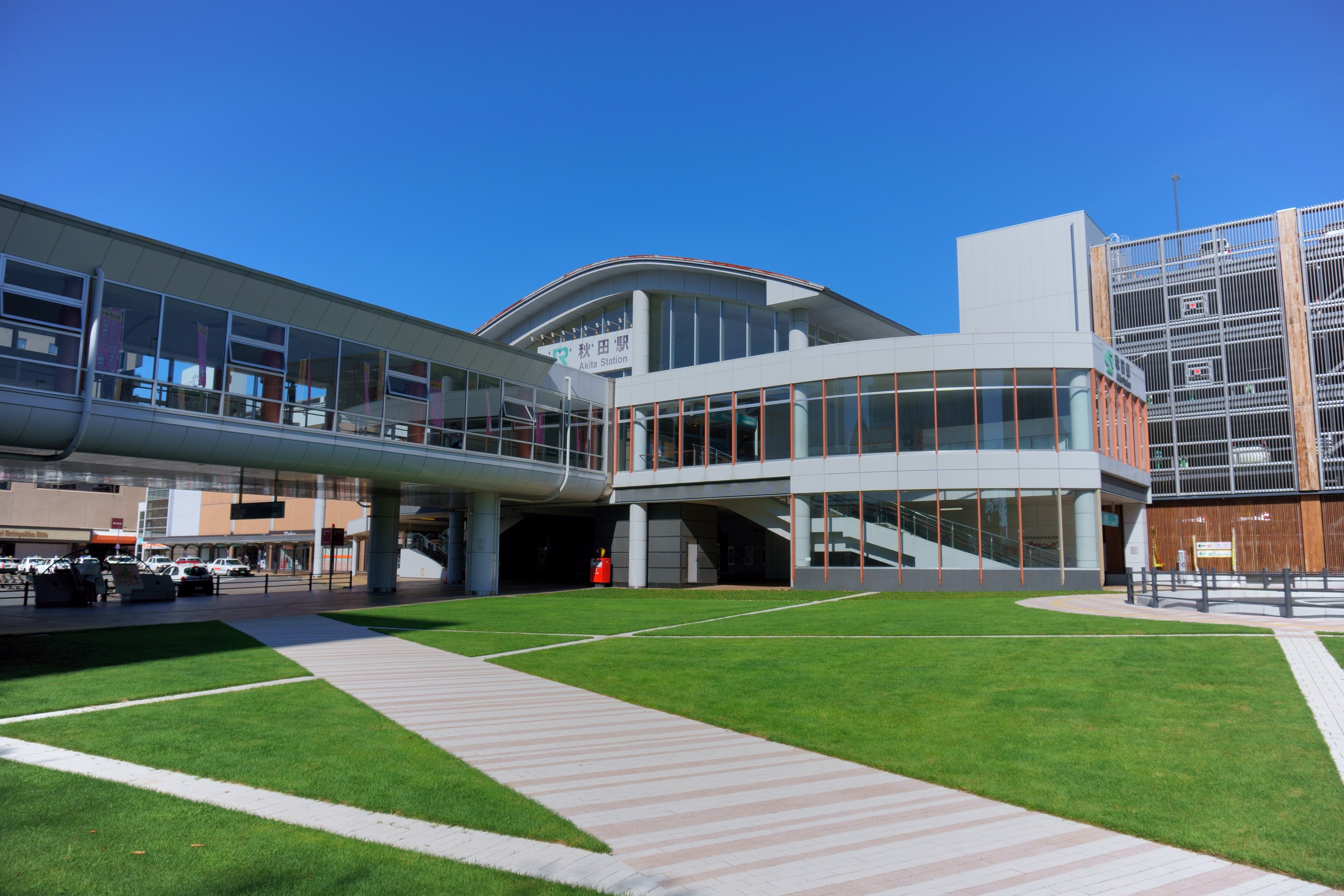 秋田駅西口駅前広場。2019年から2020年にかけ駅前広場の芝生化工事が行われ、8月1日より開放されるようになった。